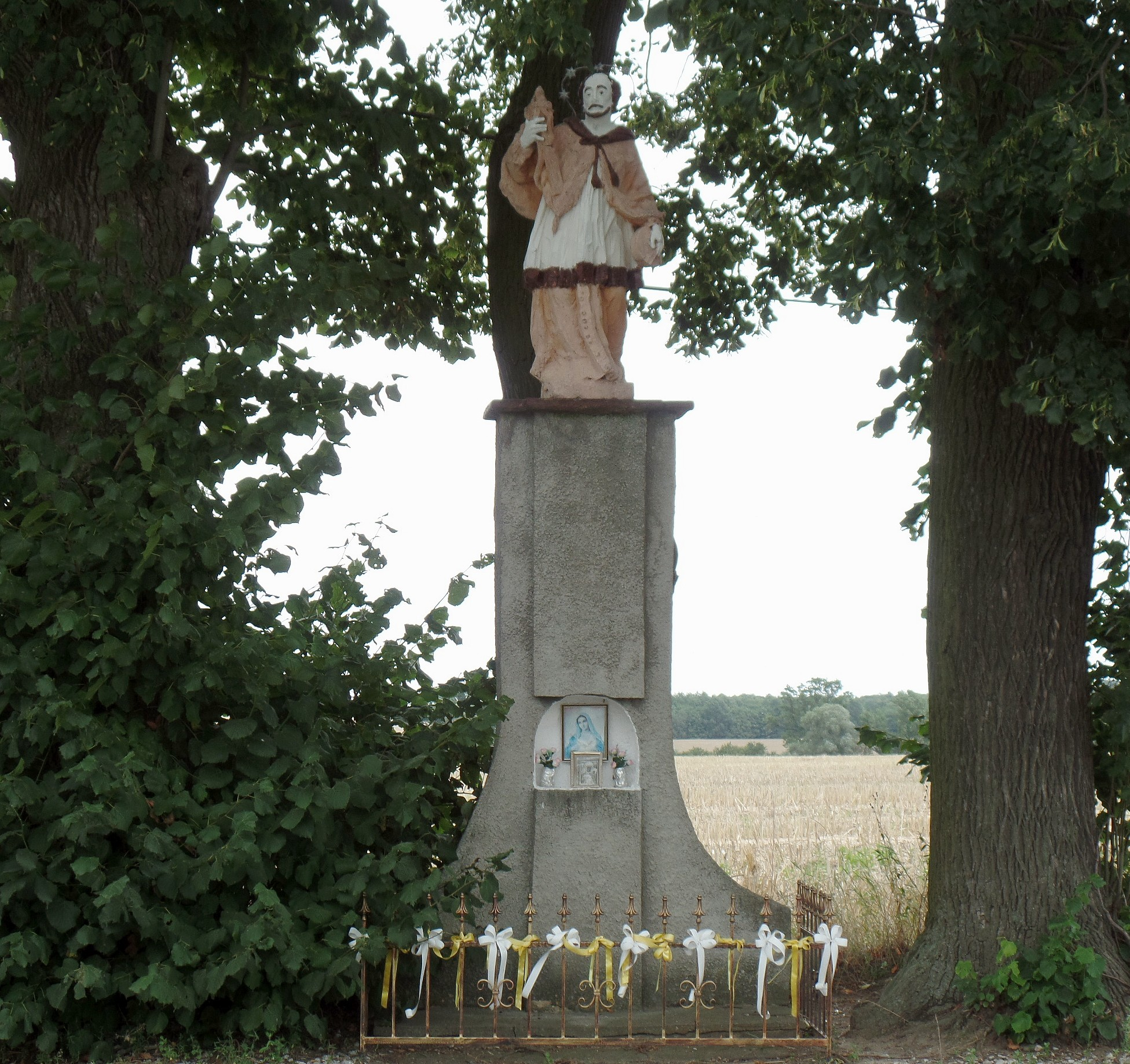 Figura przydrożna w Bednarach.